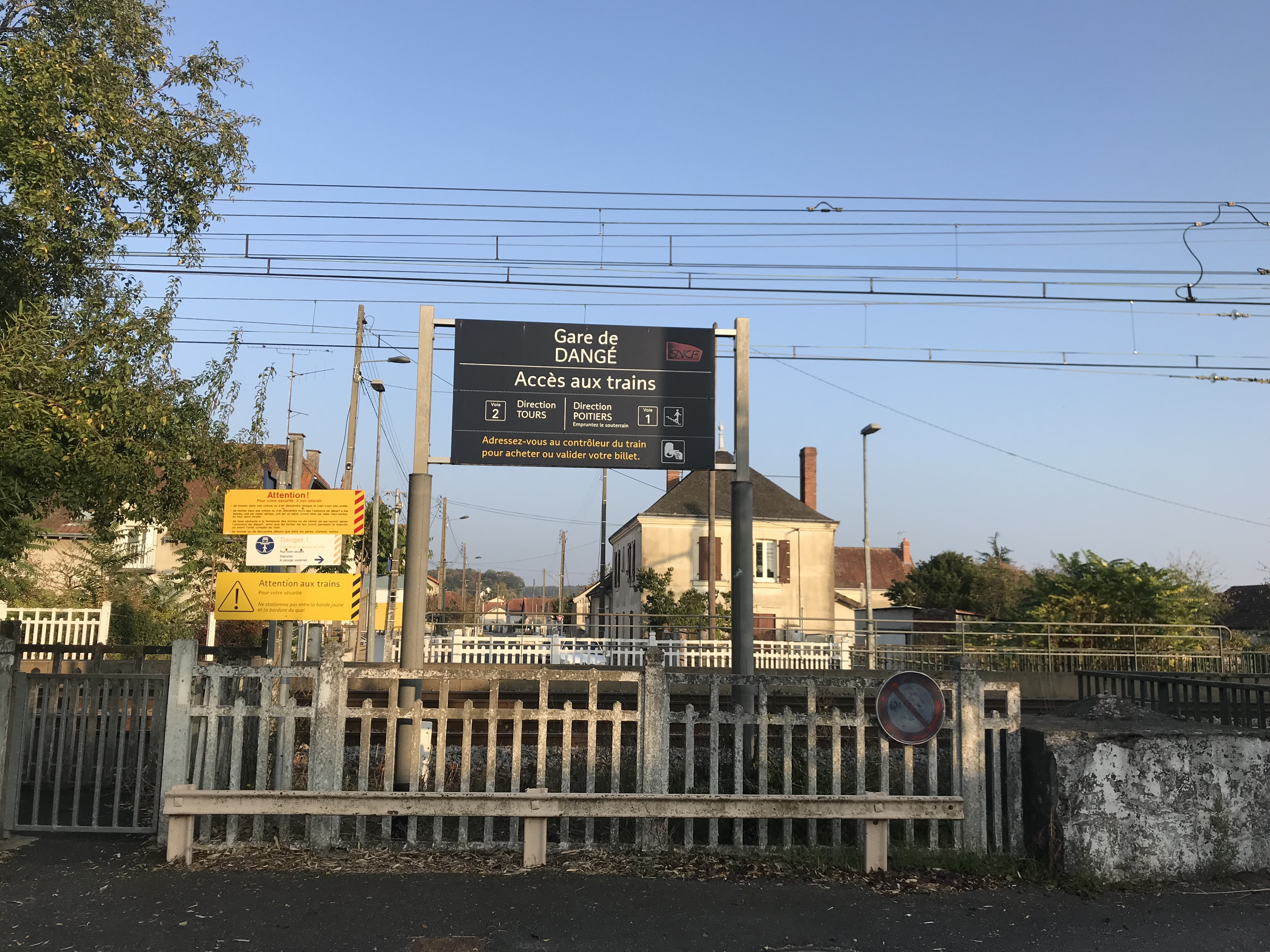 La Gare de Dangé (86) en 2018